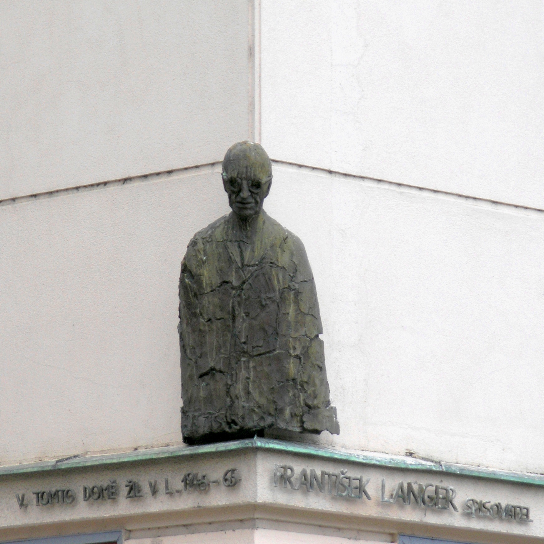 Praha, Smíchov - busta Františka Langera na rohu Preslovy ulice a náměstí 14. října, autor: Kurt Gebauer